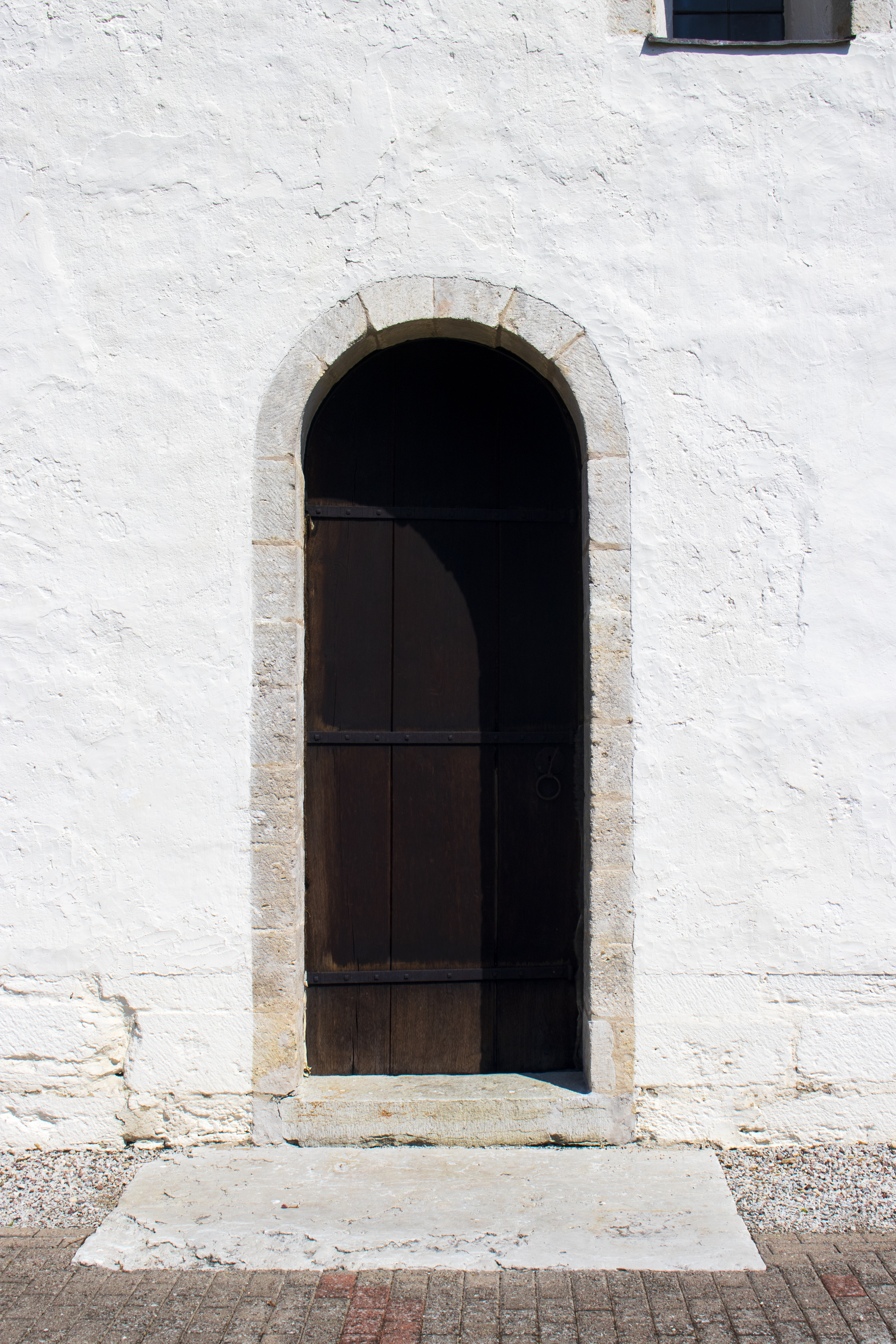 Portal sur da nave da igrexa de Garde, na illa sueca de Gotland.